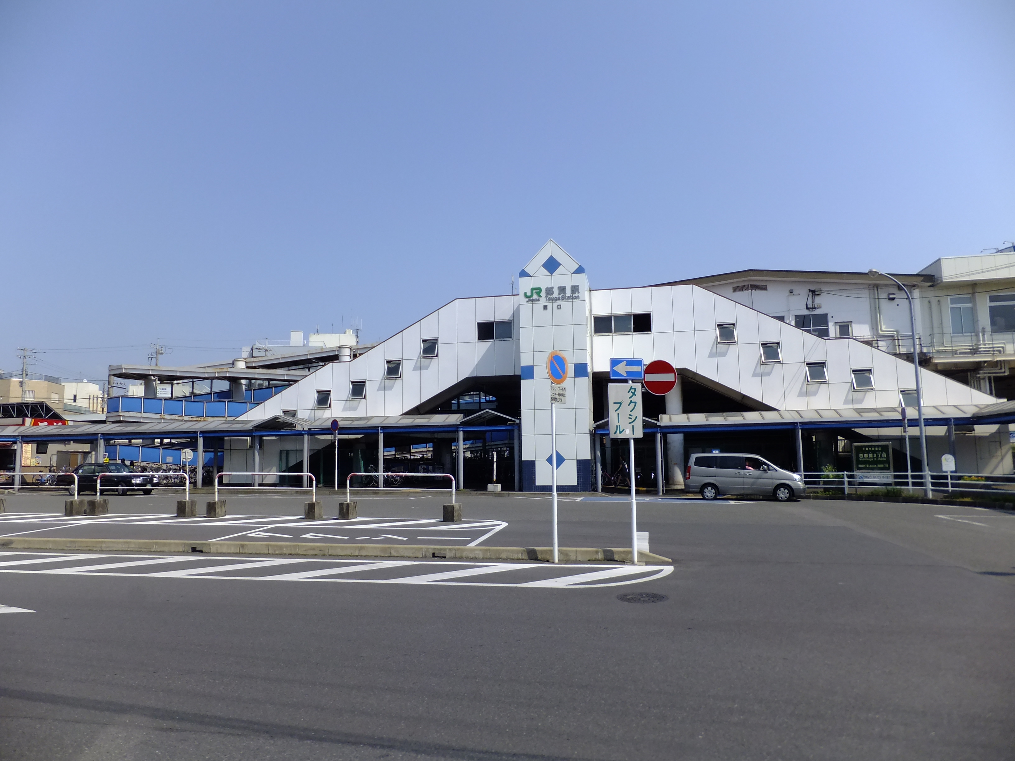 JR総武本線都賀駅西口